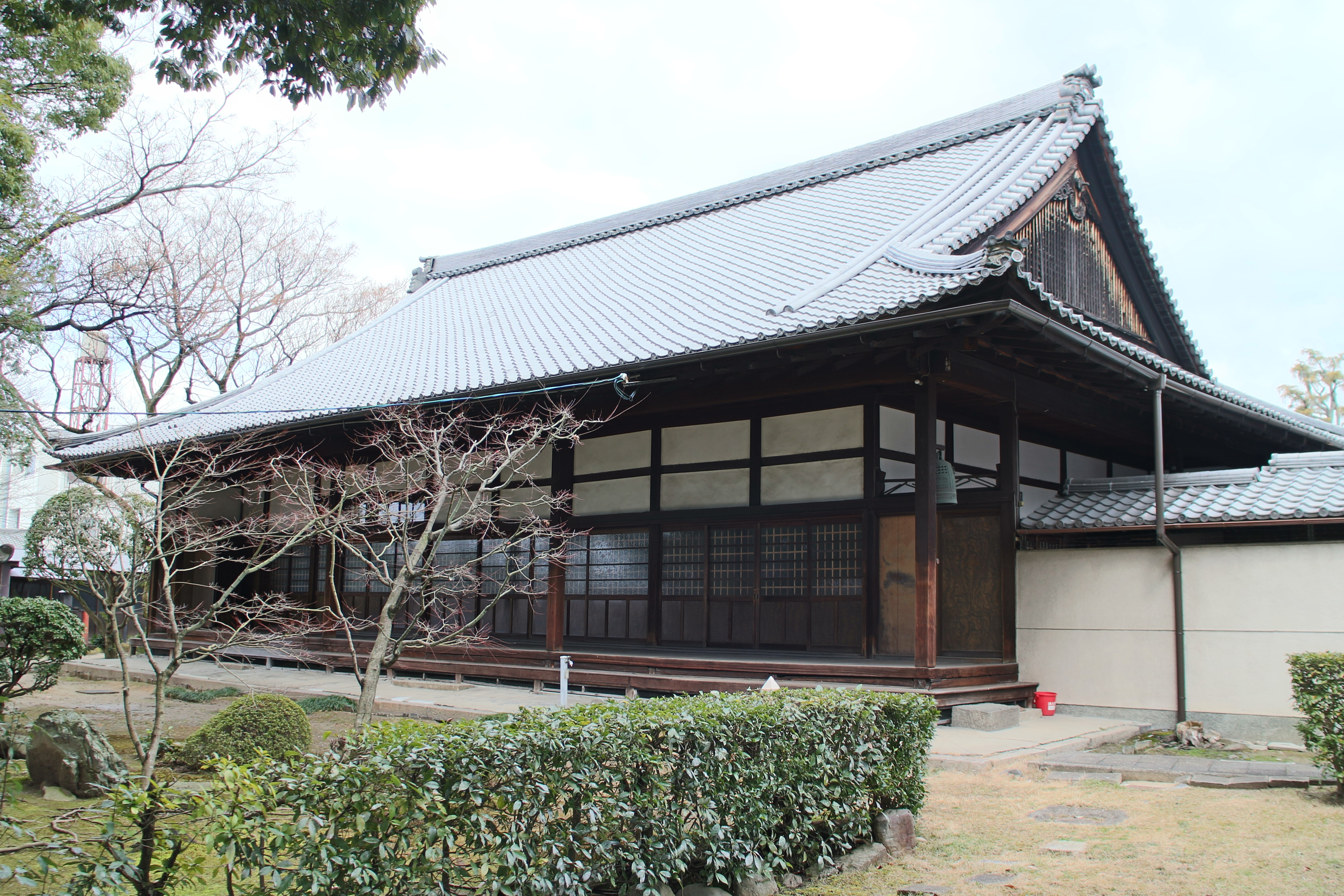 京都万寿寺の客殿